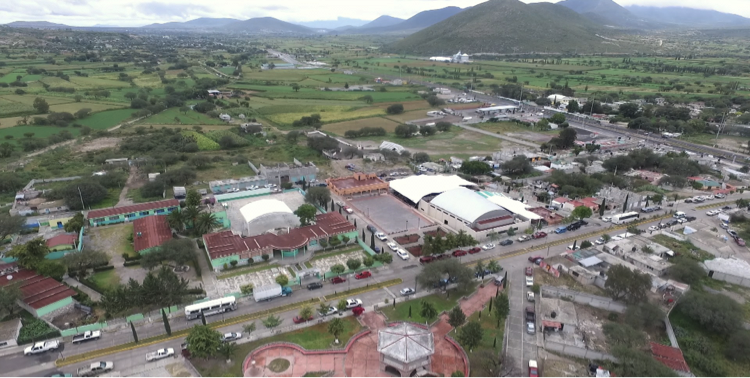 Vista del Centro de Patria Nueva